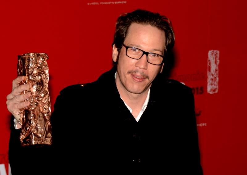 Reda Kateb à la cérémonie des César